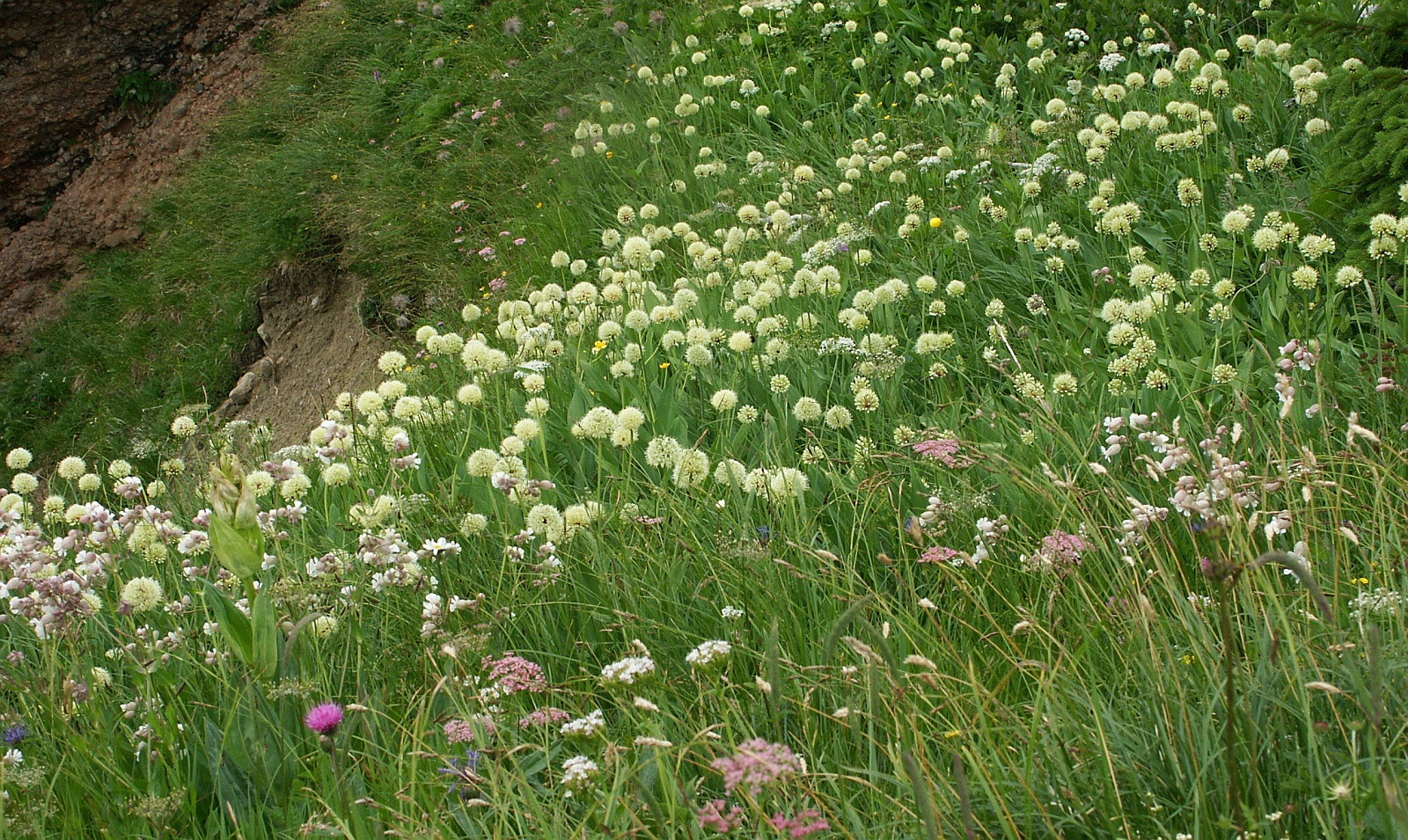 Allium victorialis, Allgäuer Alpen, Germany